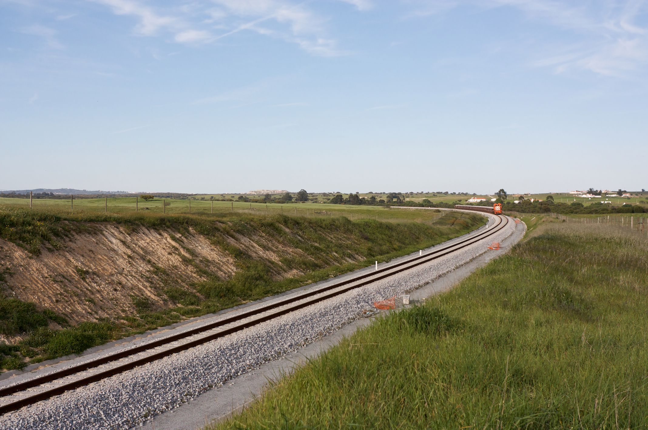 Tipo: Comboio de Transporte de Balastro 96210 [Monte das Flores - Poceirão] Local: Tojal [Linha de Évora, PK 104] Data e hora: 8 de Abril de 2010 [18h16] Material: Locomotiva 1568 + 14 vagões CP Us